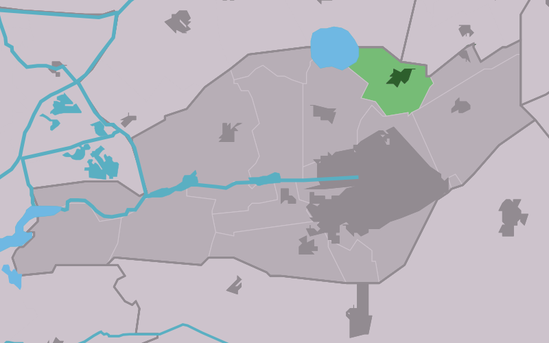 Kaartsje fan himrik fan Rottefalle